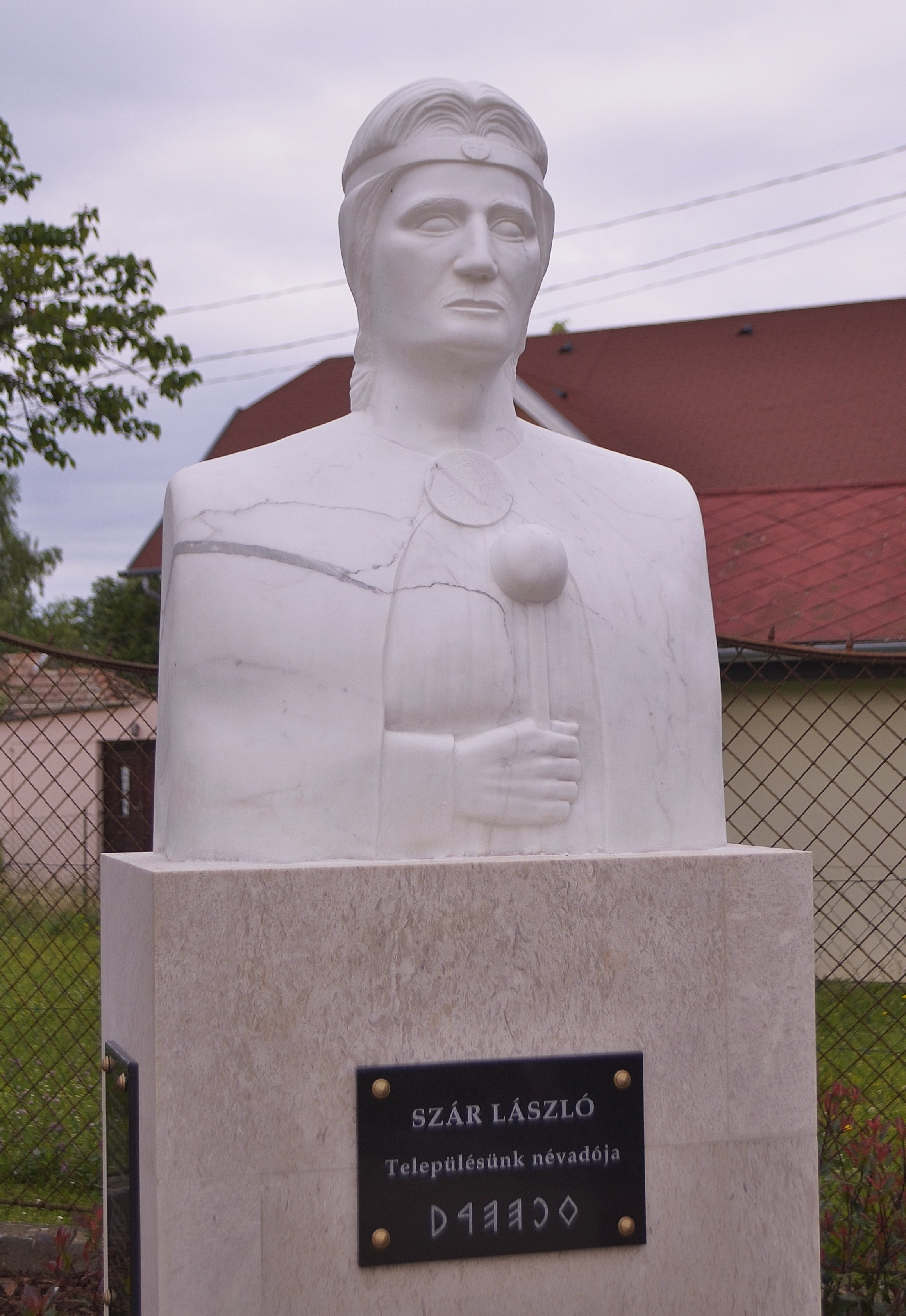 Torma János szobrászművész Árpád-házi Szár Lászlóról készített mellszobra Balatonszárszón